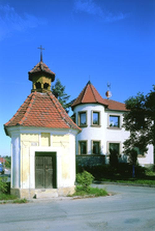 Plzeň 2-Hradiště, Na Rychtě, kaple, vila Osadníků 54/6.